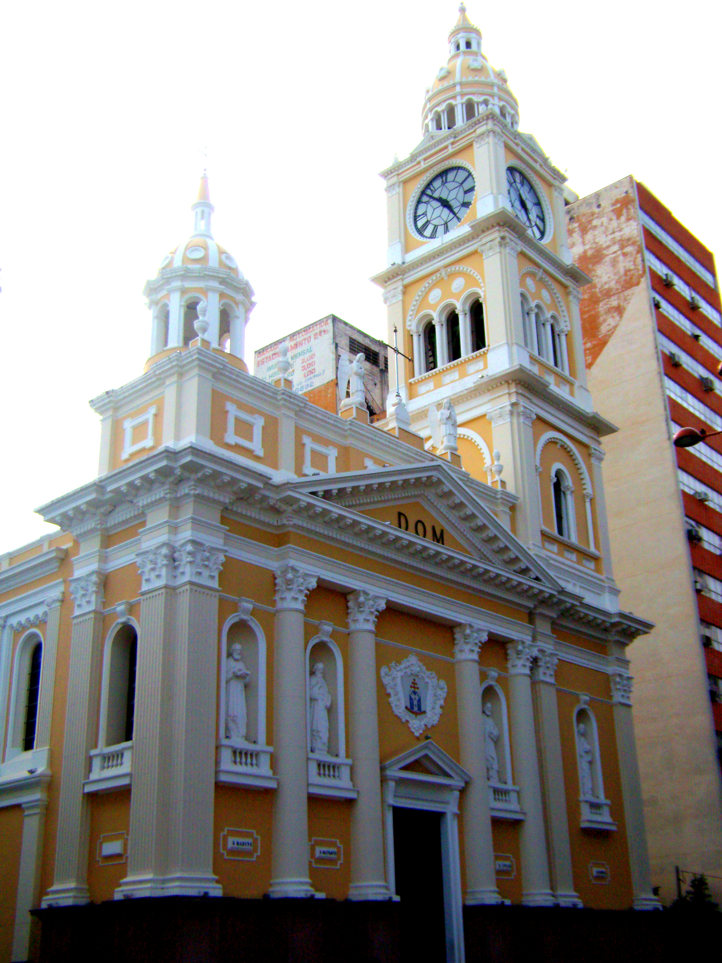 Catedral Metropolitana de Sorocaba.